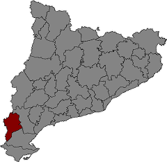 Mapa de Catalunya on es ressalta la posició de la Terra Alta